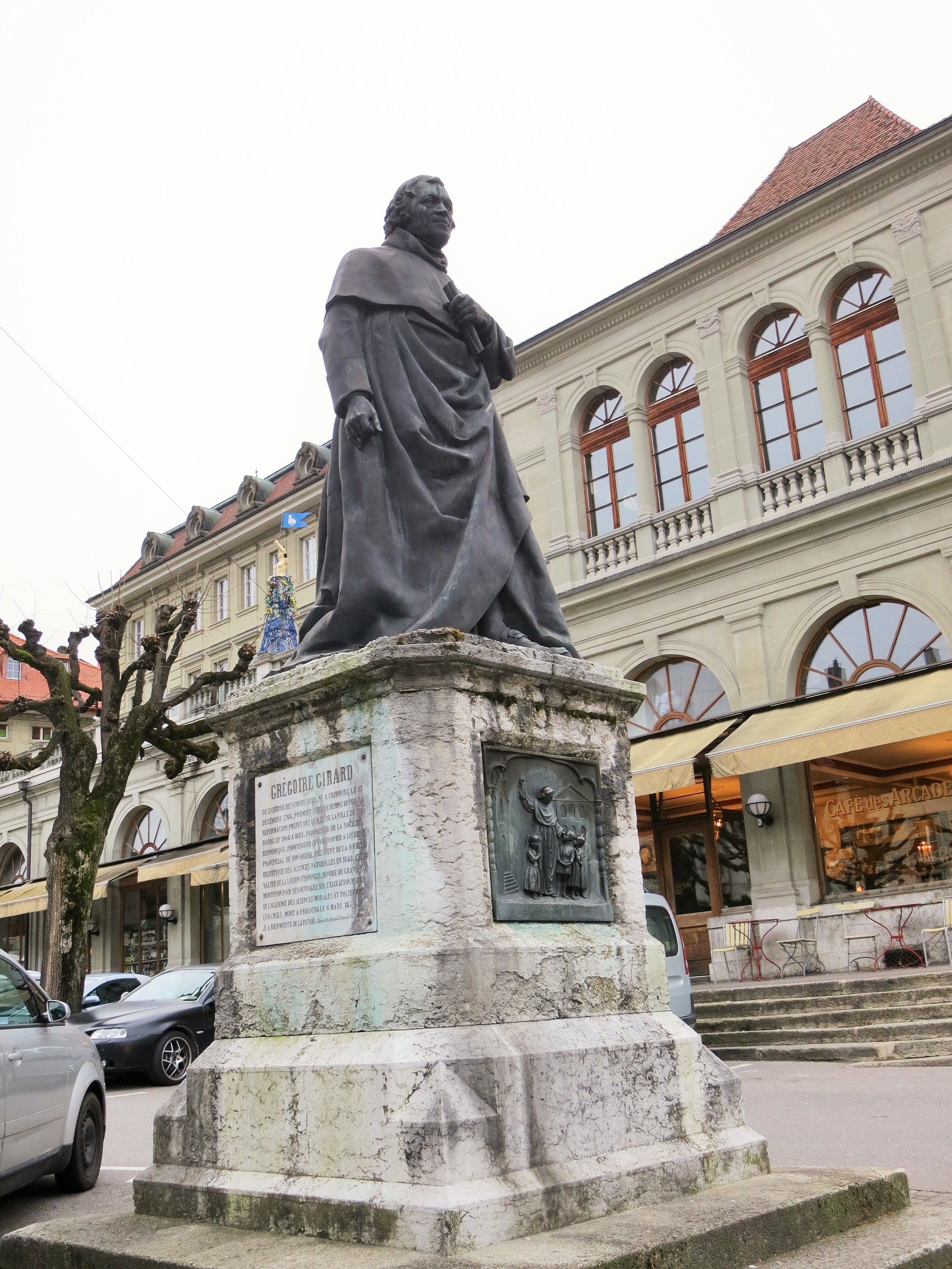 Grégoire Girard, Denkmal in Fribourg, Schweiz